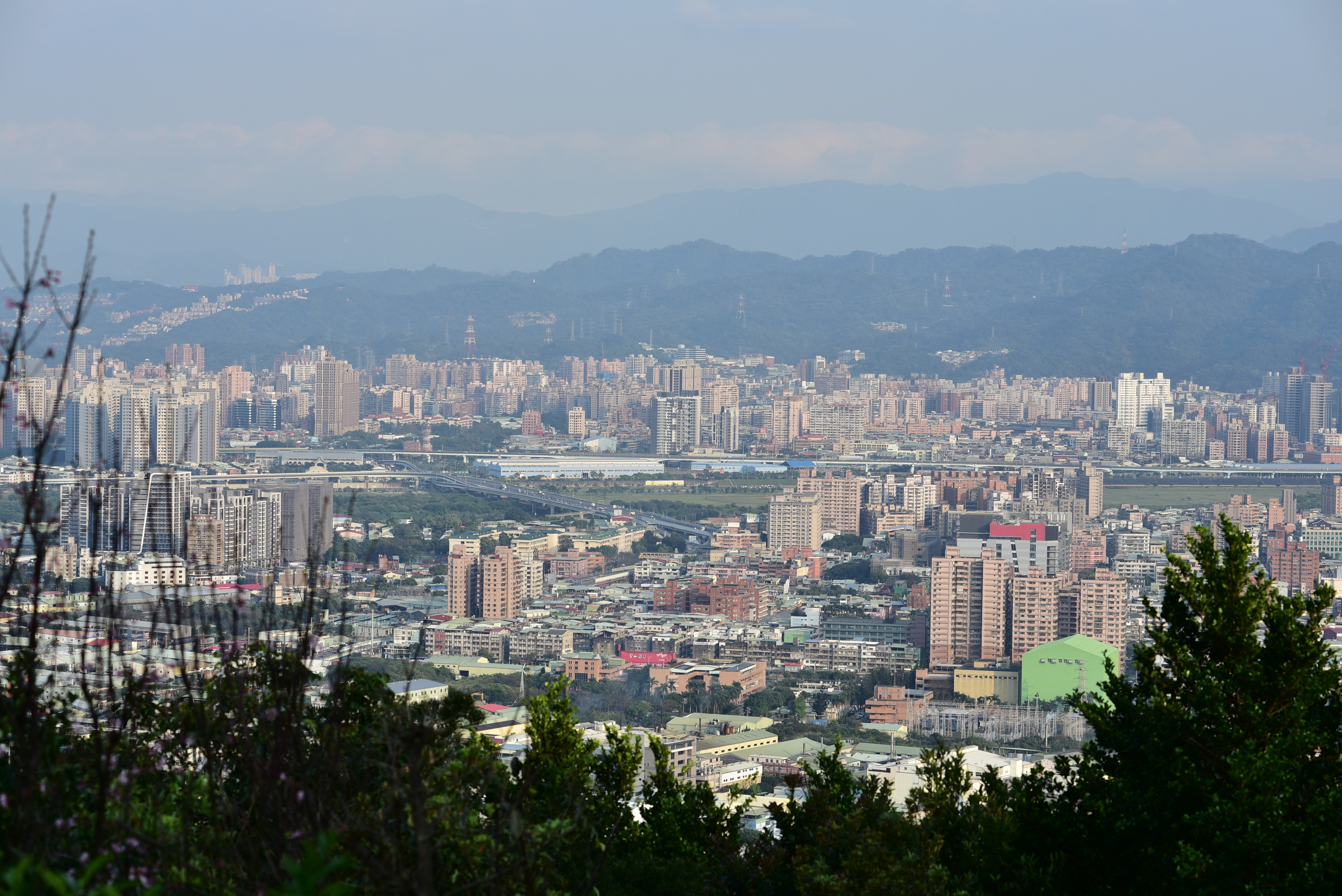 中文（台灣）: FUZHOU bridge(NewTaipei)2018 新北市浮洲橋